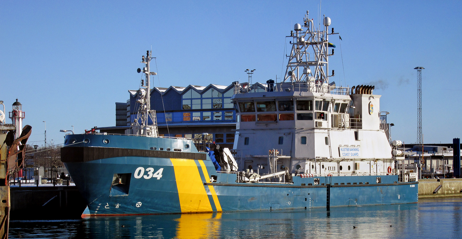 KBV 034 På besök i Ystad. 17 jan 2016.